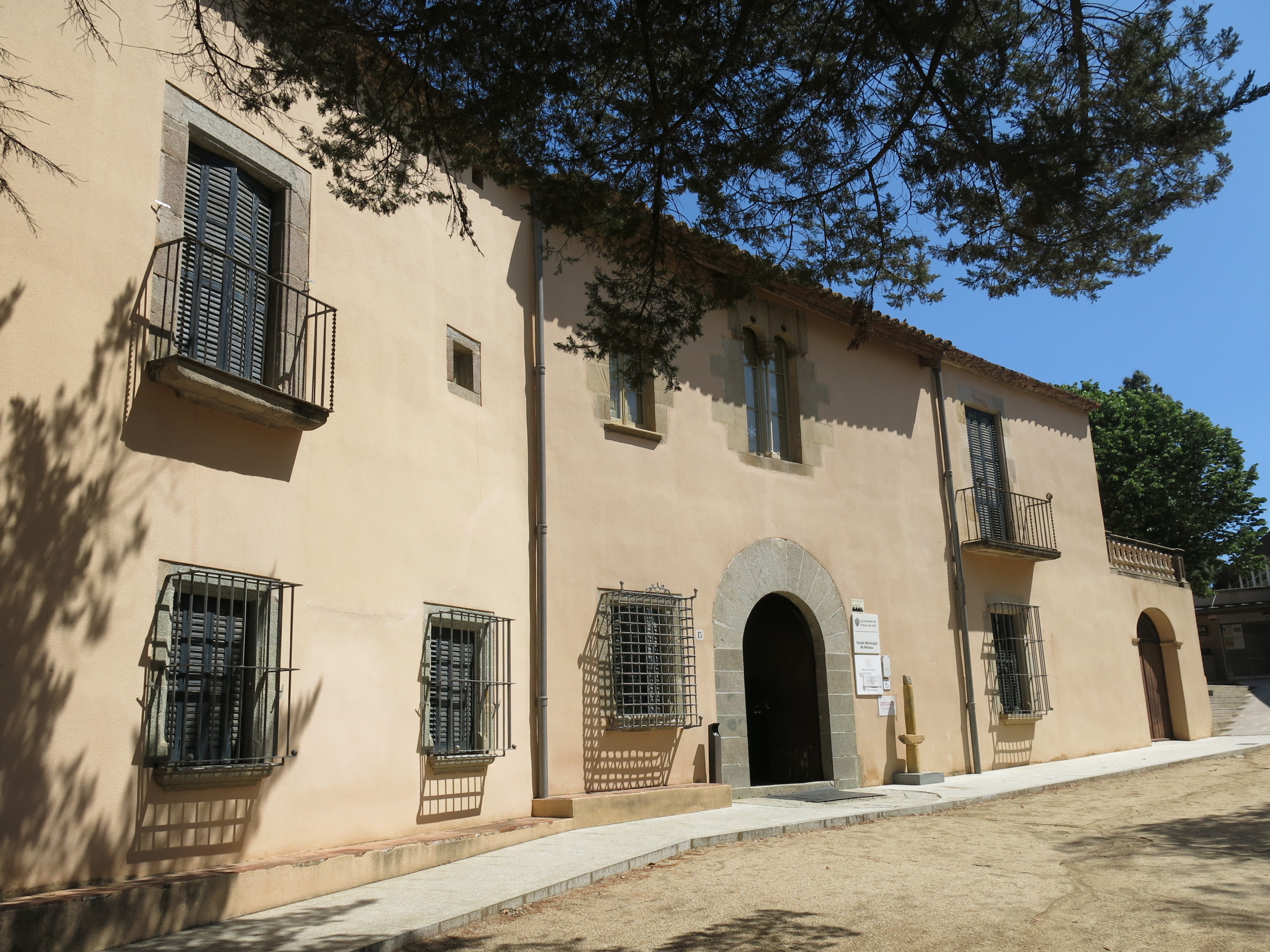 Can Figueras (Premià de Dalt)